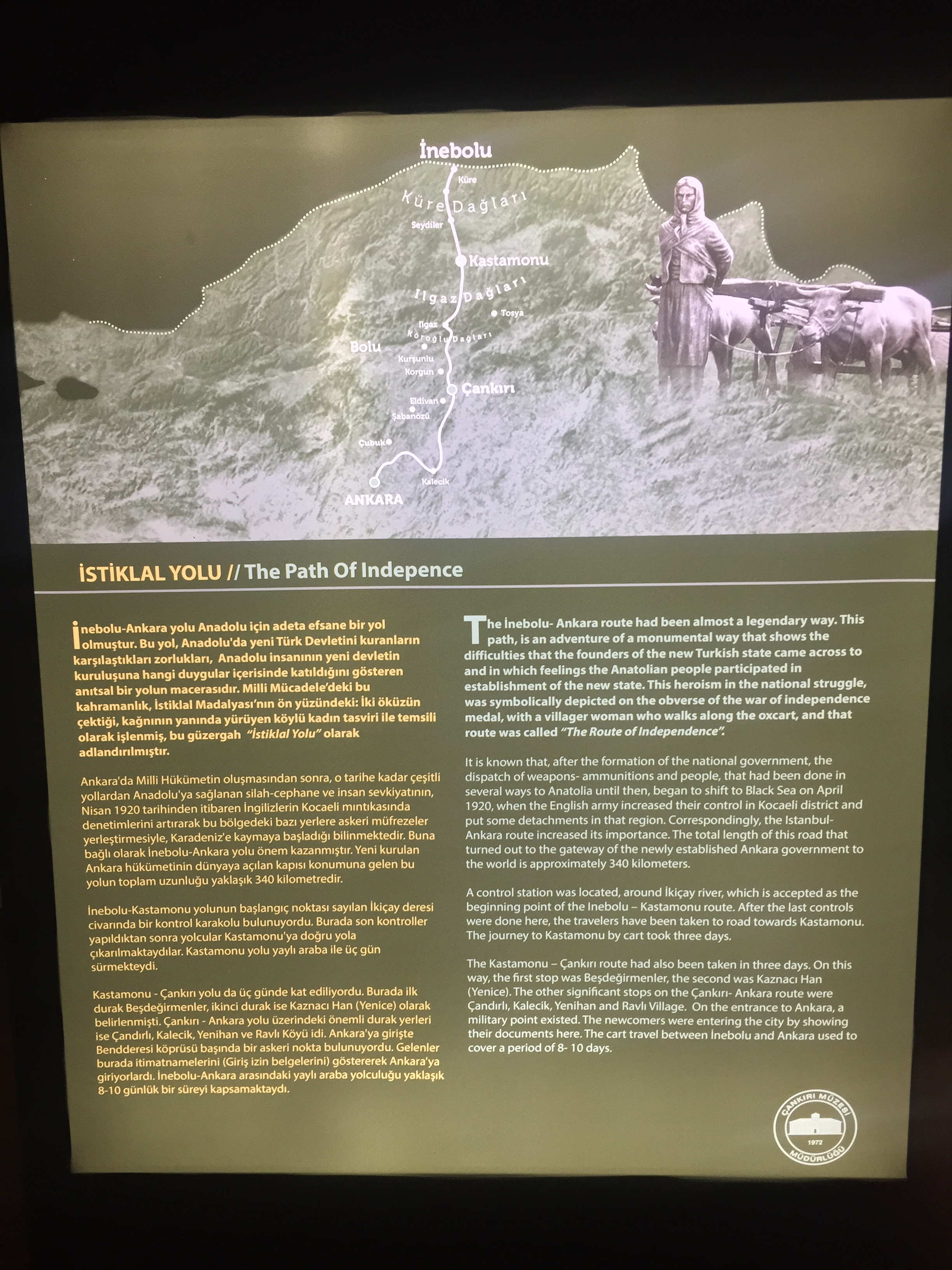 Çankırı Müzesinden bir görünüm.